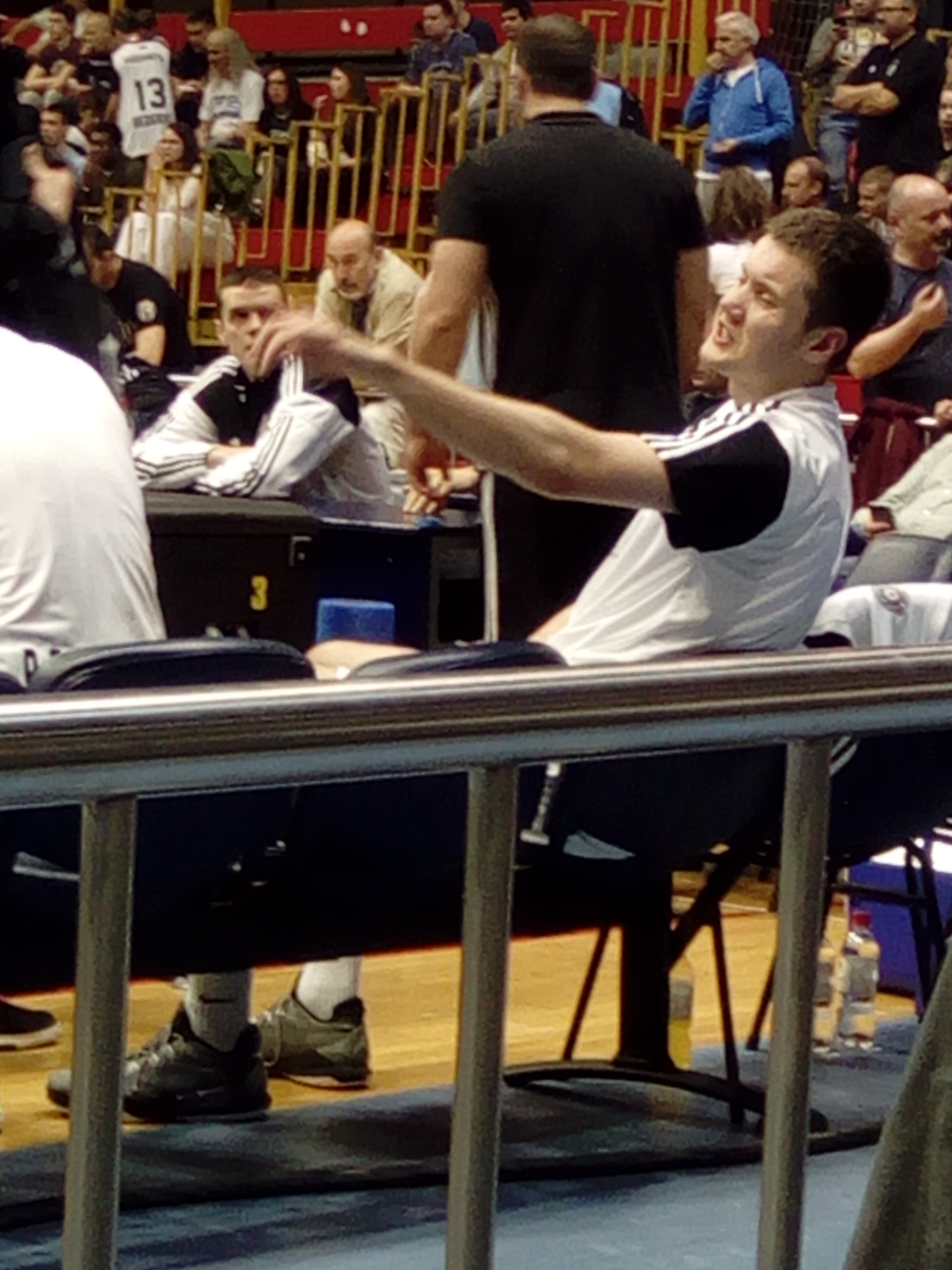 Srpski (latinica): Andreja Milutinović u dresu Partizana na meču protiv Konstantina 14.5. 2016.